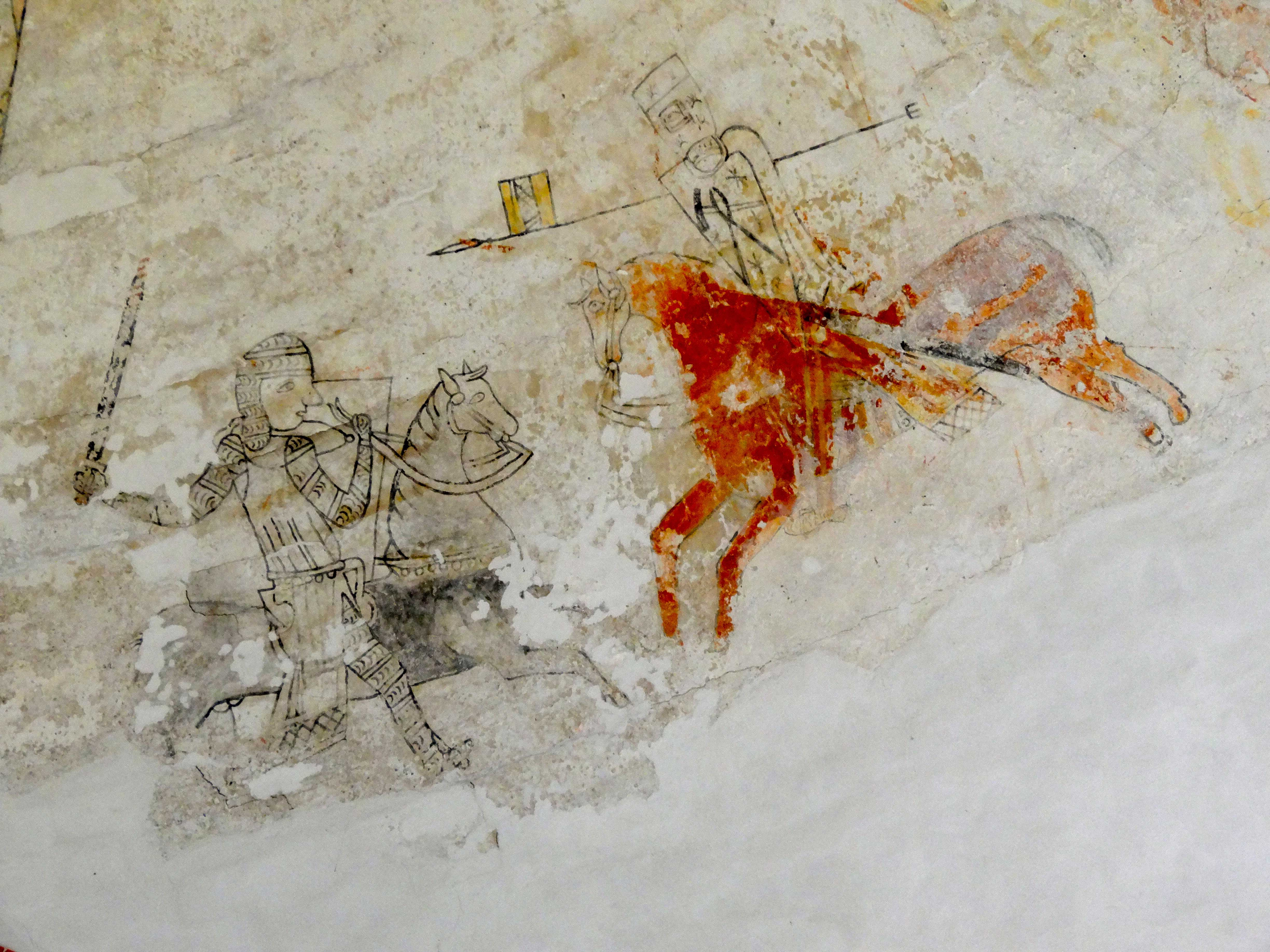 Kerk van Den Andel - gewelfschildering: riddergevecht